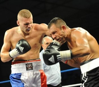 Christopher Rebrassé vs Pierre Moreno